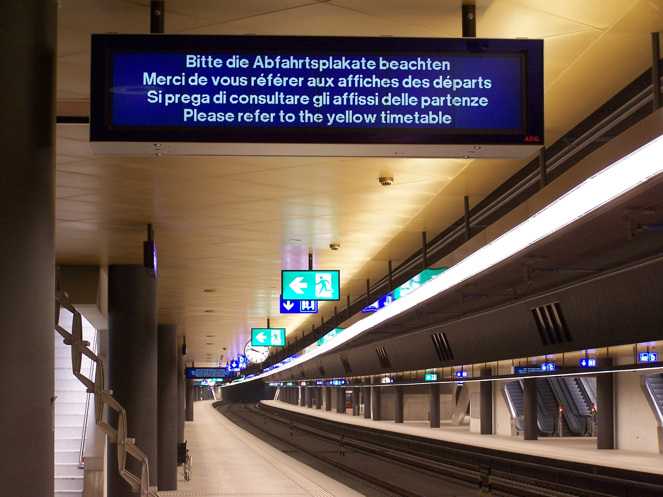 Zugzielanzeiger im Bahnhof Löwenstrasse. Ganz hinten im Bild der Weinbergtunnel